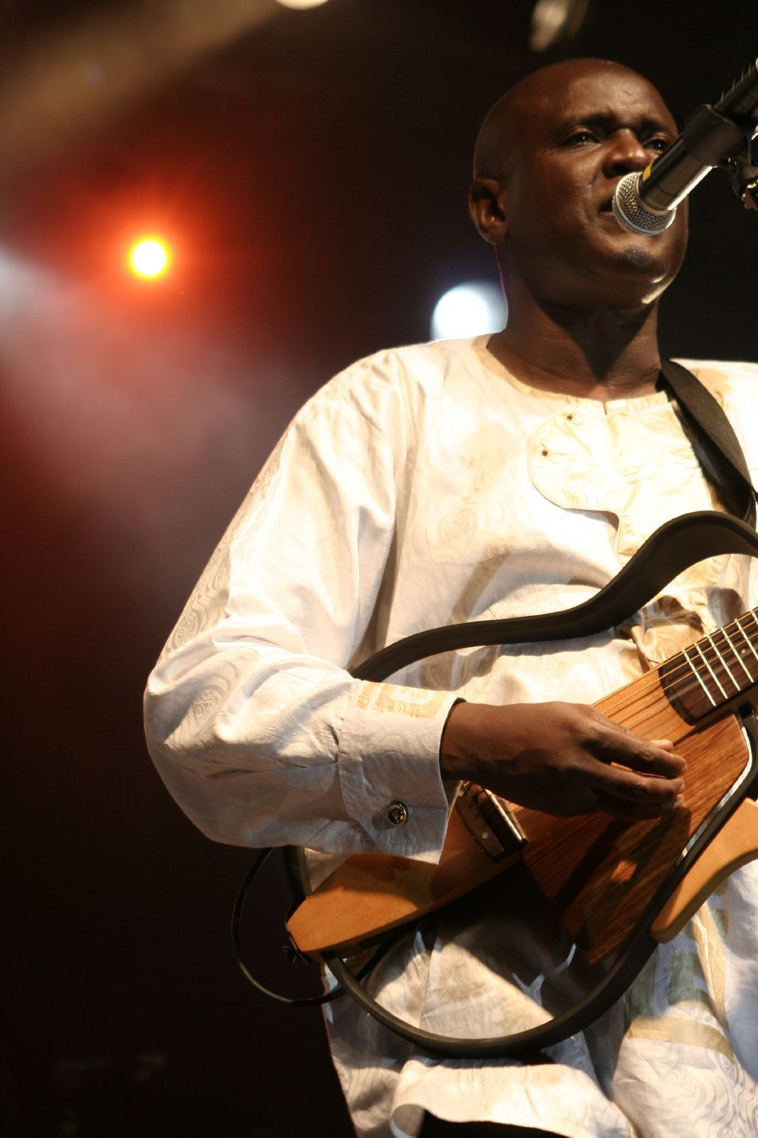 Ismael Lö @ Mumes Festival 2007 - 10082007Ismael Lö @ Mumes Festival 2007 (Tenerife, Las Canarias, Spain) - 10/08/2007